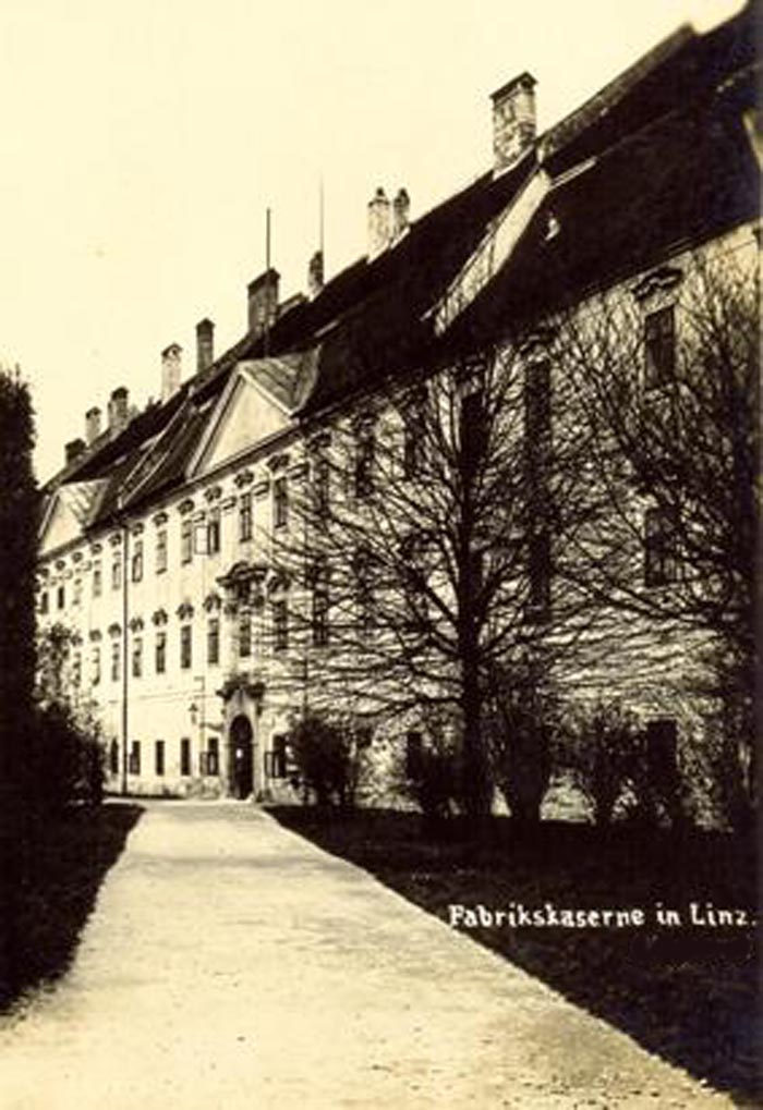 sog. Fabrikskaserne des k.u.k. InfRgt 14 in Linz